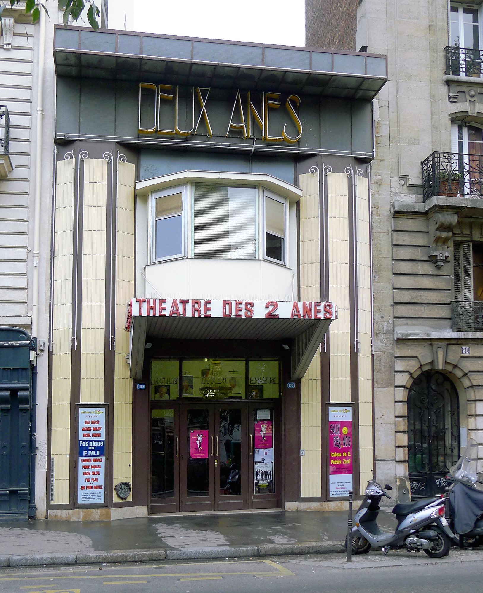 Théâtre des deux ânes, boulevard de Clichy - Paris XVIII